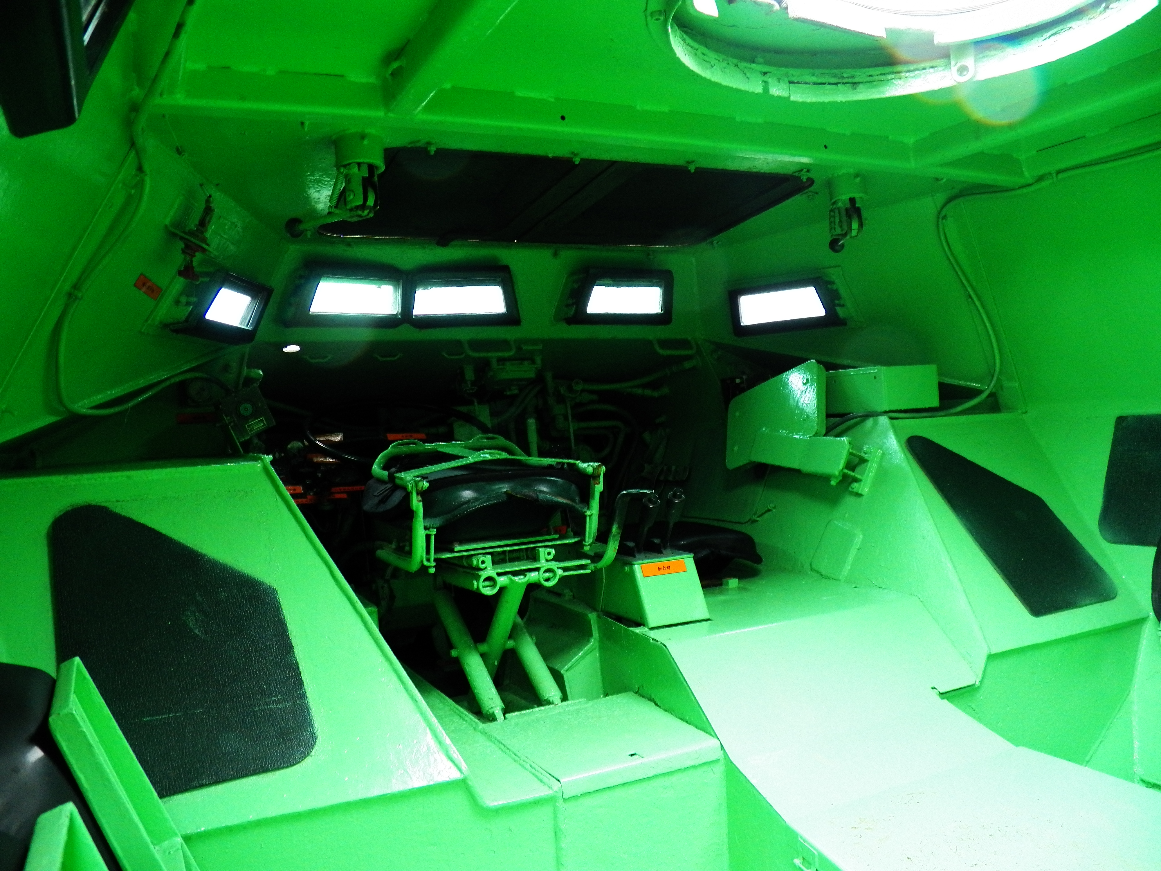 2013年裝甲兵學校營區開放活動，從左側所見V-150S裝甲車前部車艙。